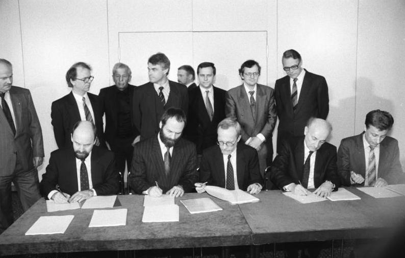 ADN/Oberst/12.4.90/Berlin: Die an der neuen DDR-Regierung beteiligten Parteien haben im Hause der Volkskammer die Koalitionsvereinbarung unterzeichnet. Sie trägt den Titel "Grundsätze der Koalitionsvereinbarung zwischen den Fraktionen der CDU, der DSU, dem DA, den Liberalen ( FDP, BFD, F.D.P.) und der SPD vom 12. April 1990". Unmittelbar vor Beginn der zweiten Parlamentstagung während der Unterschrift v.l.n.r.: Rainer Eppelmann, Markus Meckel, Lothar de Maiziere, Hans-Wilhelm Ebeling und Prof. Dr. Rainer Ortleb.